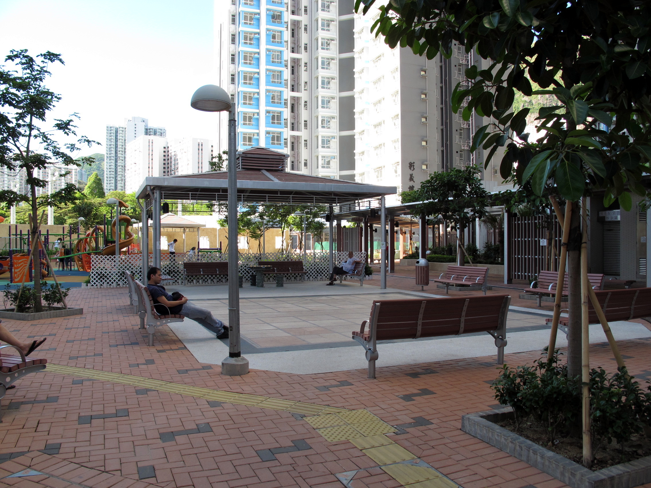 Choi Tak Estate Open Space